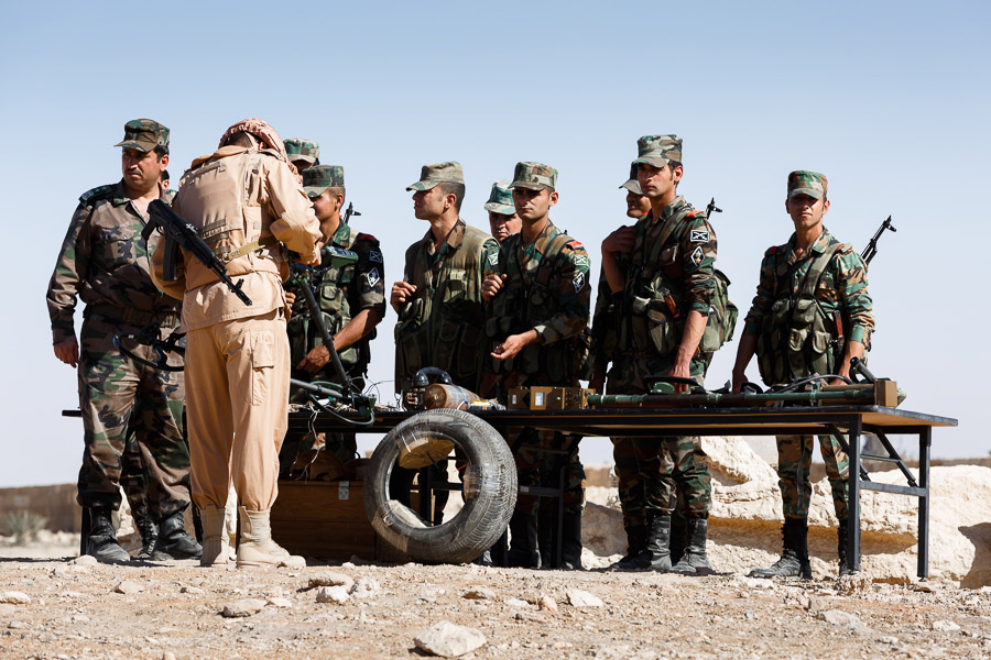 Работа зарубежных СМИ в городе Пальмире во время концерта «С молитвой о Пальмире»